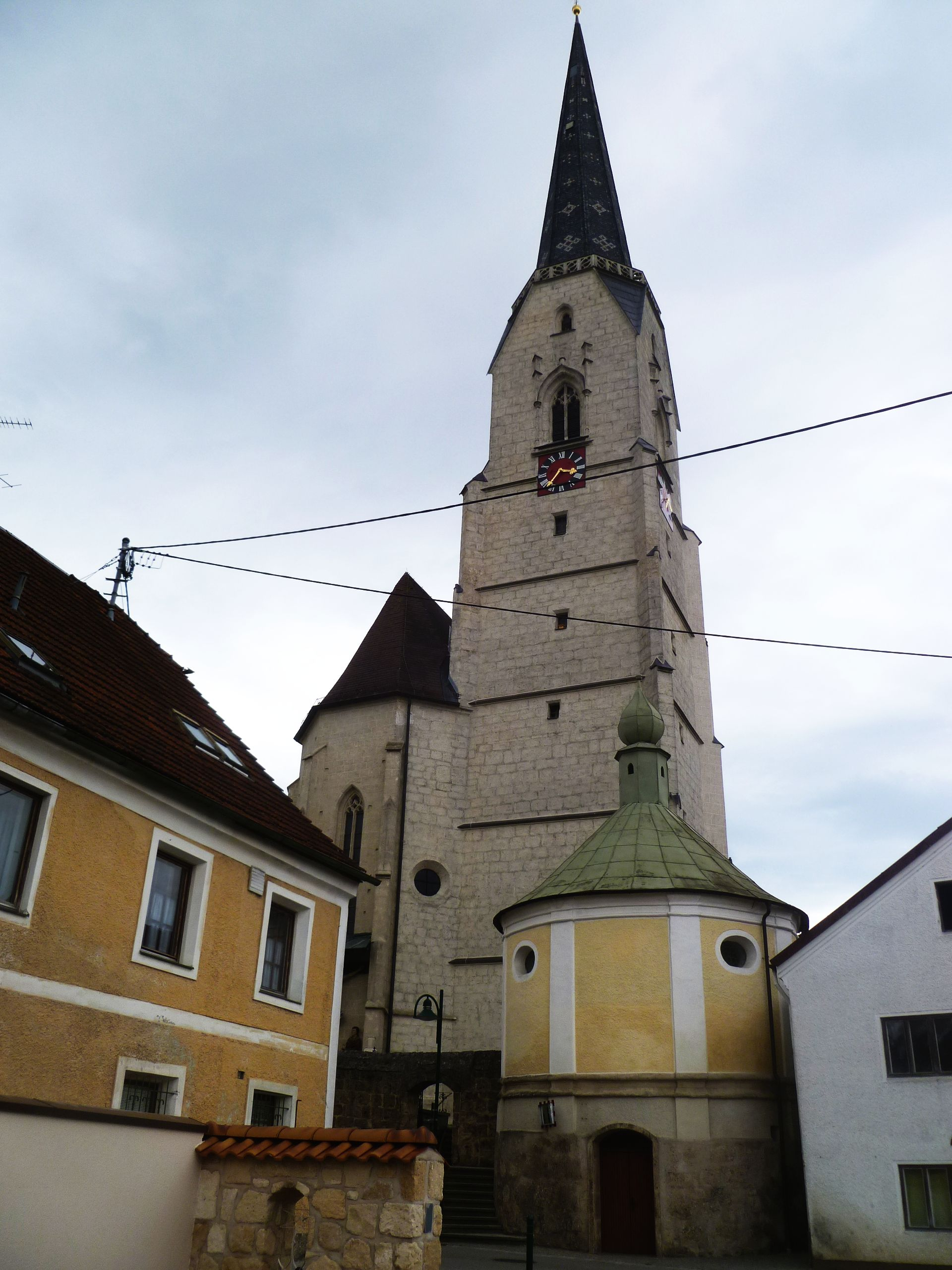 Kath. Pfarrkirche Mariä Himmelfahrt mit Friedhof und Portalanlage